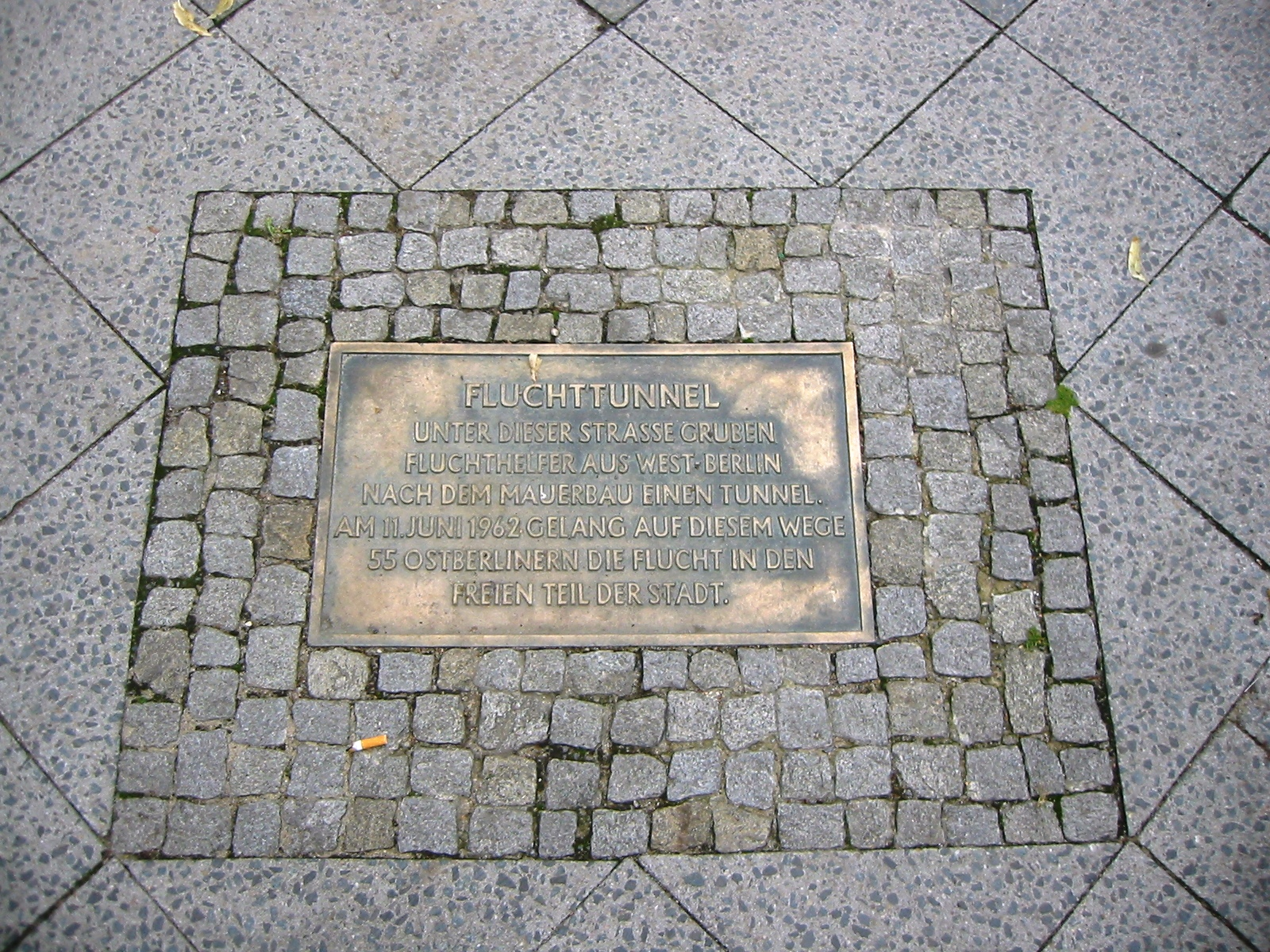 Gedenktafel für den Fluchttunnel in der Elsenstraße in Berlin-Alt-Treptow